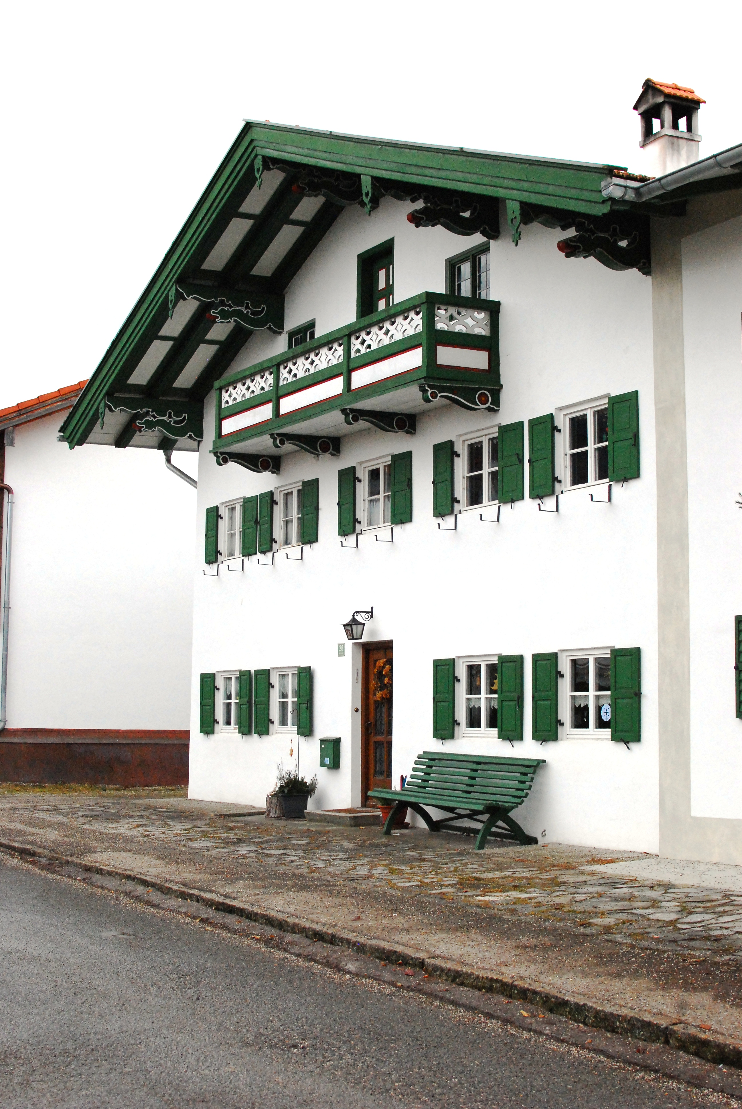 Bauernhaus Asamstraße 28 in Benediktbeuern, Landkreis Bad Tölz-Wolfratshausen, Regierungsbezirk Oberbayern, Bayern. Als Baudenkmal unter Aktennummer D-1-73-113-2 in der Bayerischen Denkmalliste aufgeführt.